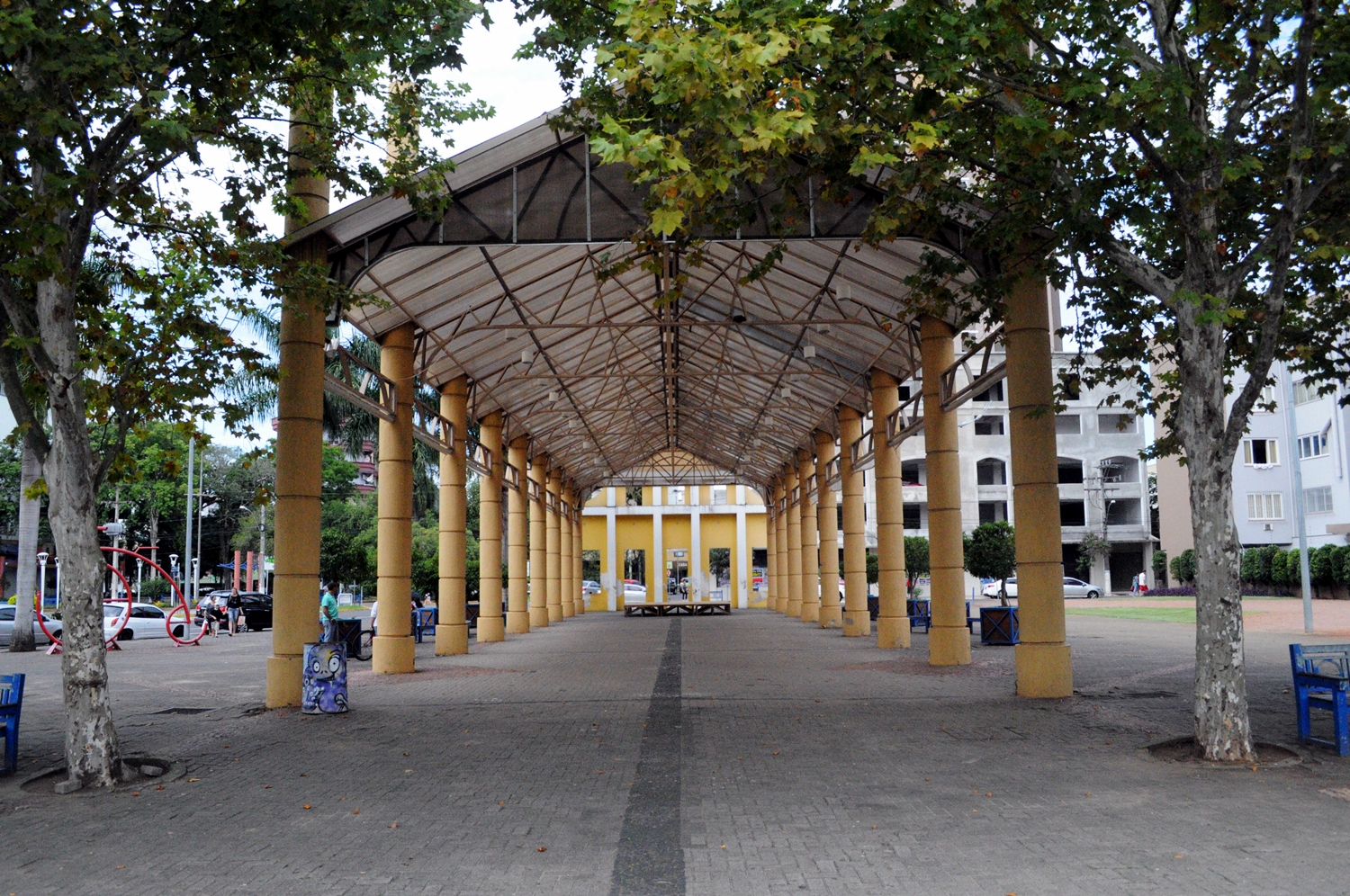 Largo Irmãos Vetter, Campo Bom.